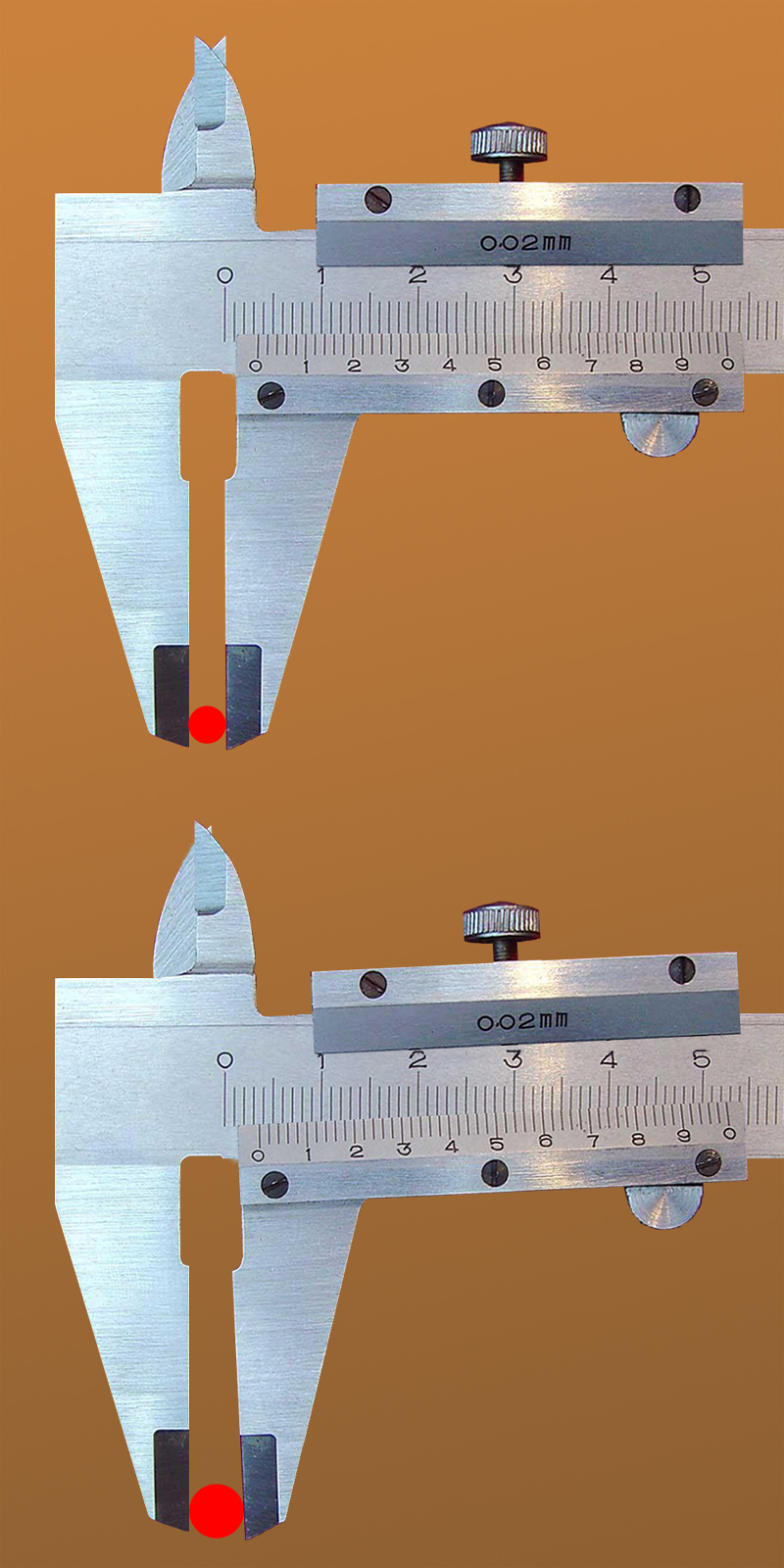 Beschreibung